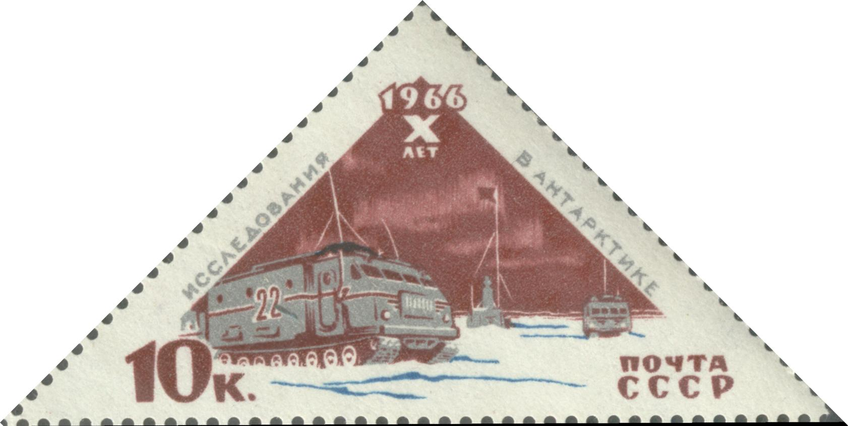 Почтовая марка СССР. 1966, 14 февраля. 10 копеек. Серия 10-летие советских исследований в Антарктике. Тягач-вездеход